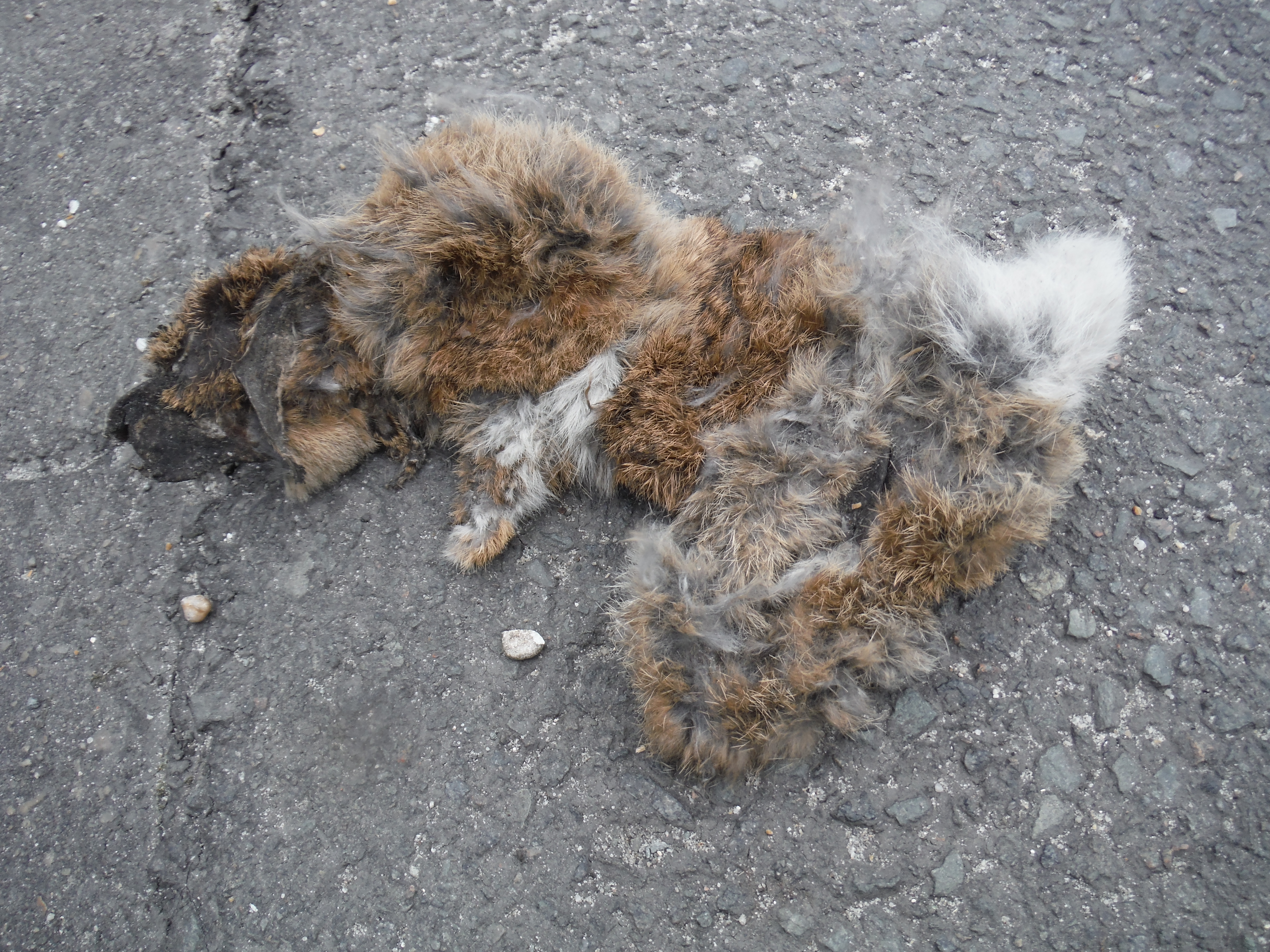 Animal mort au bord de la route près de Bordeaux en France.